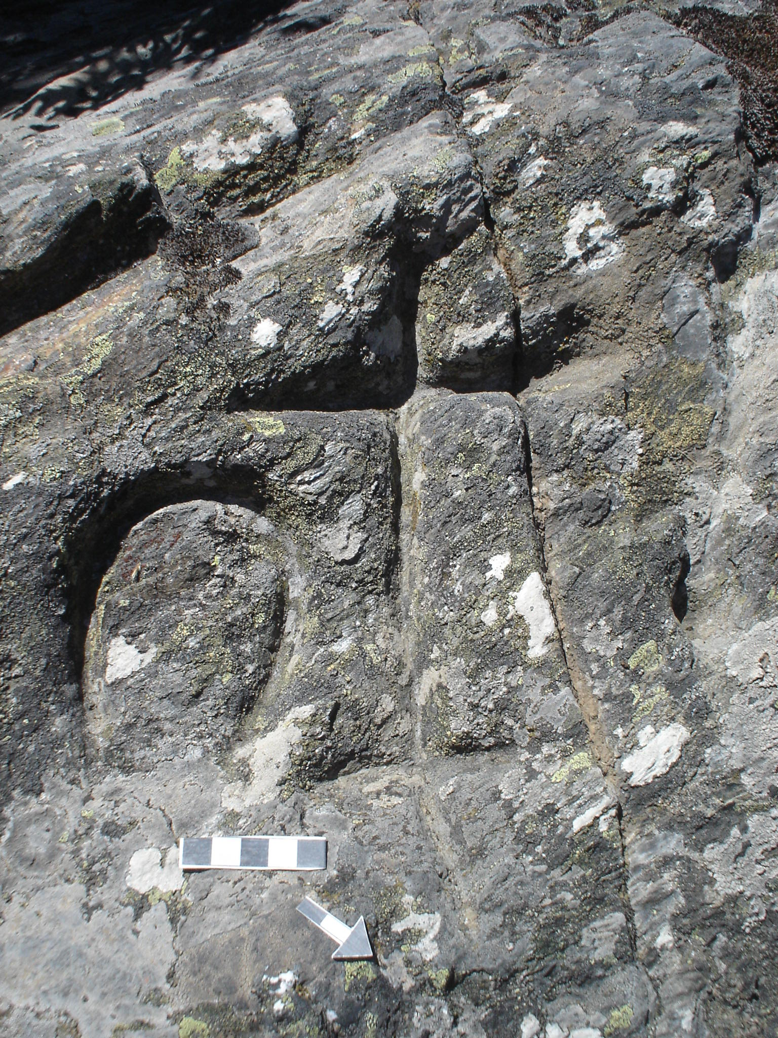 Grabados Peñas de la Cerca